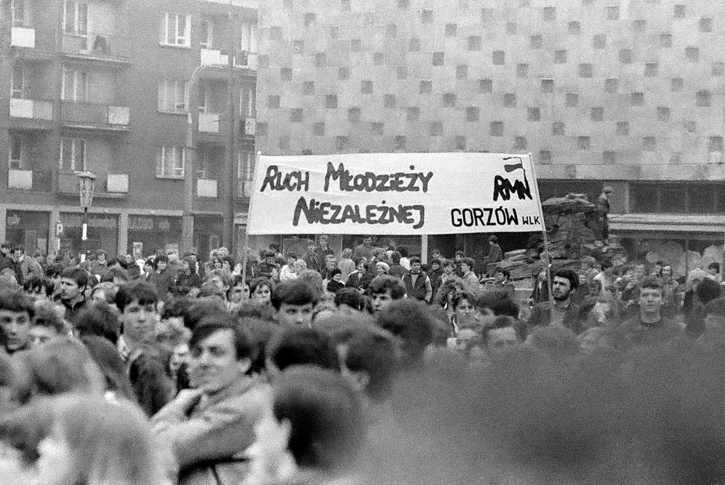 Gorzów Wlkp. Ruch Młodzieży Niezależnej, przed katedrą, podczas mszy świętej. ( ok. 1985 r. )